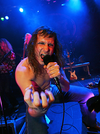 Thomas Felberg i rockbandet WE under ByLarm 2006 i Tromsø.